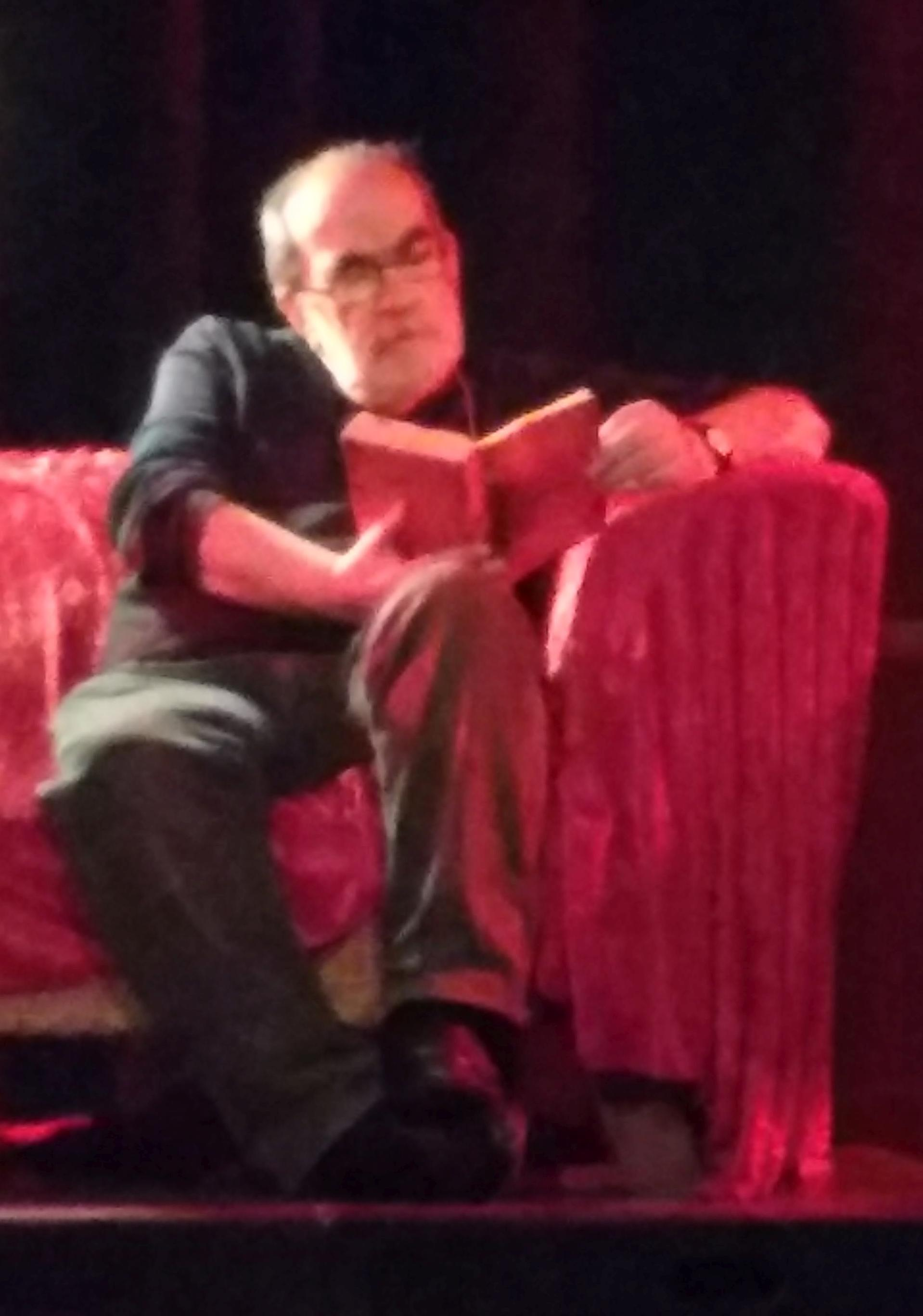 Celil Oker bei den Darmstädter Krimitagen am 31. März 2017 in der "Bessunger Knabenschule".